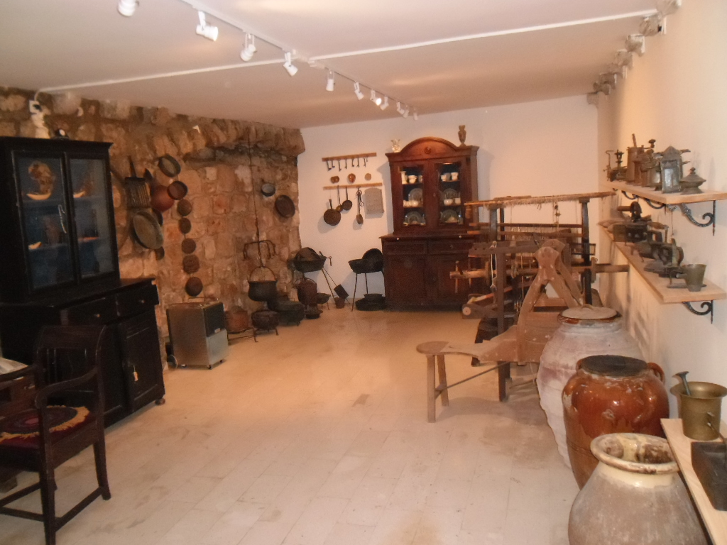 izlošci u muzeju dubrovačkog samostana Sigurata